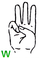 Der Buchstabe W im deutschen Fingeralphabet, entsprechend einer Infokarte des Landesverbandes Bayern der Gehörlosen e.V. (